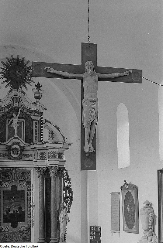 Original image description from the Deutsche Fotothek Schönhausen. Romanische Dorfkirche, Triumphkreuz